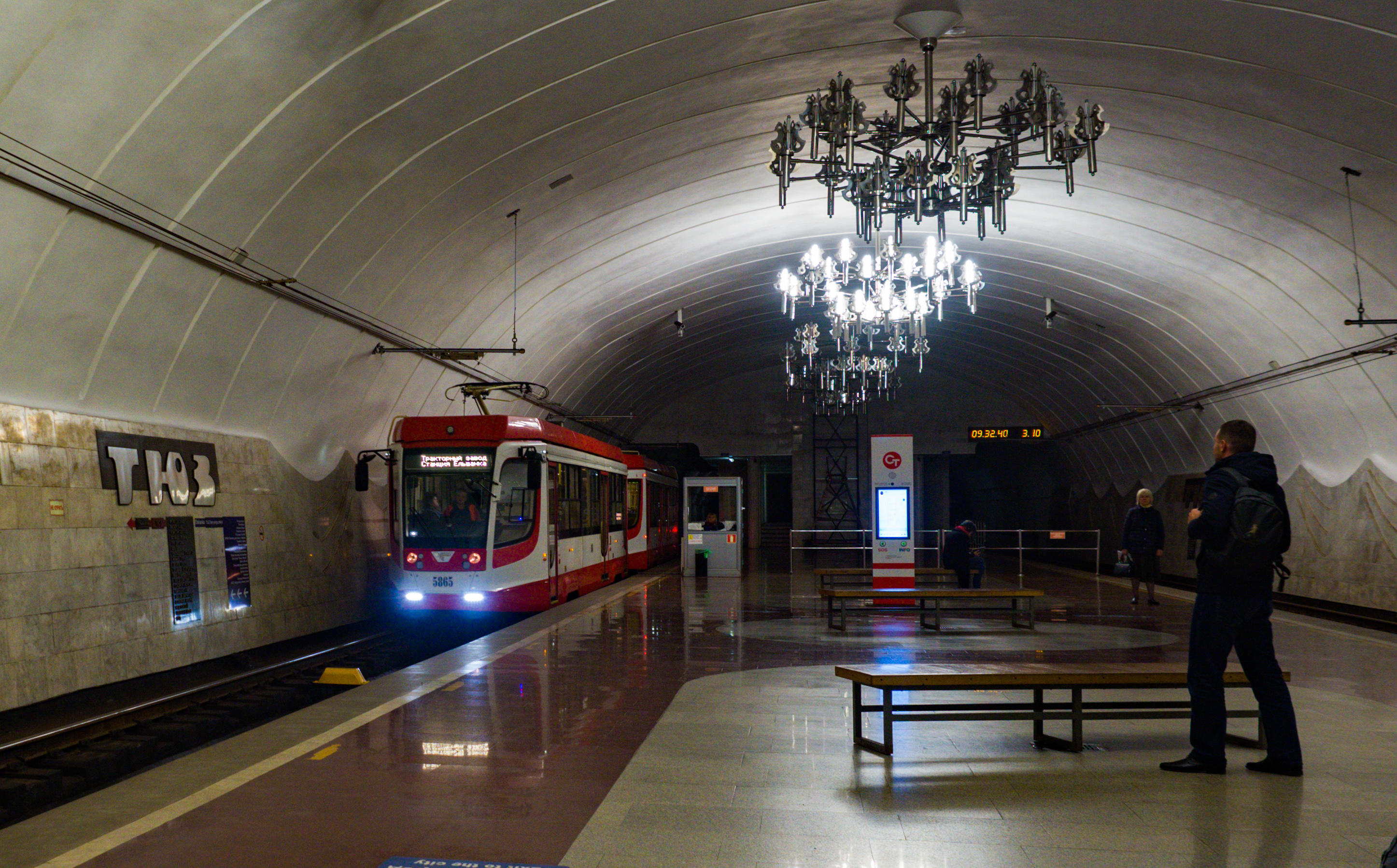 Волгоградский трамвай